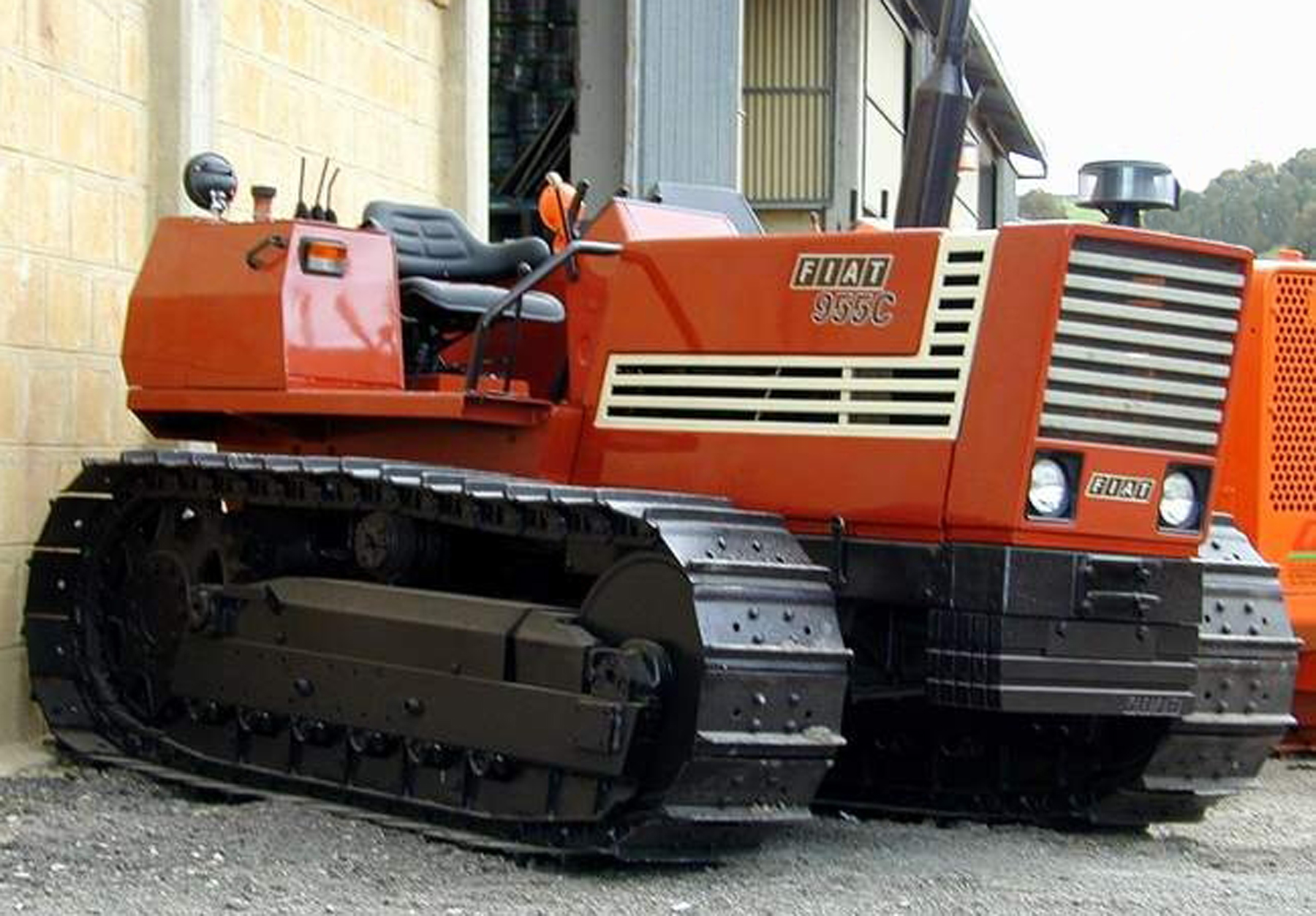 Tractor Fiat 955 C cingolato